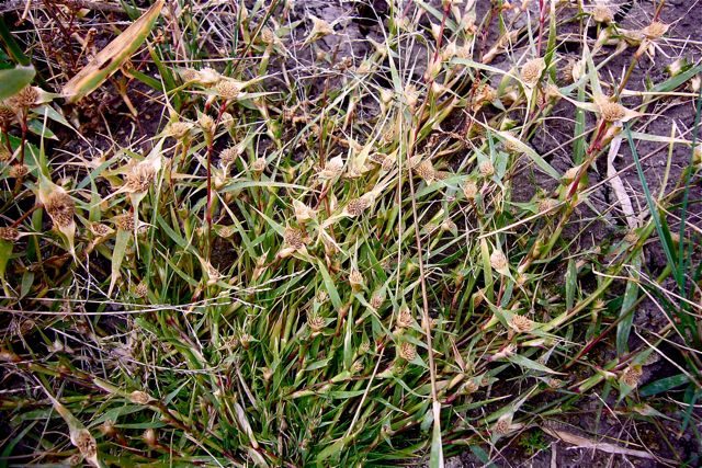 um den Neusiedler See auf salzhältigen Böden zu finden